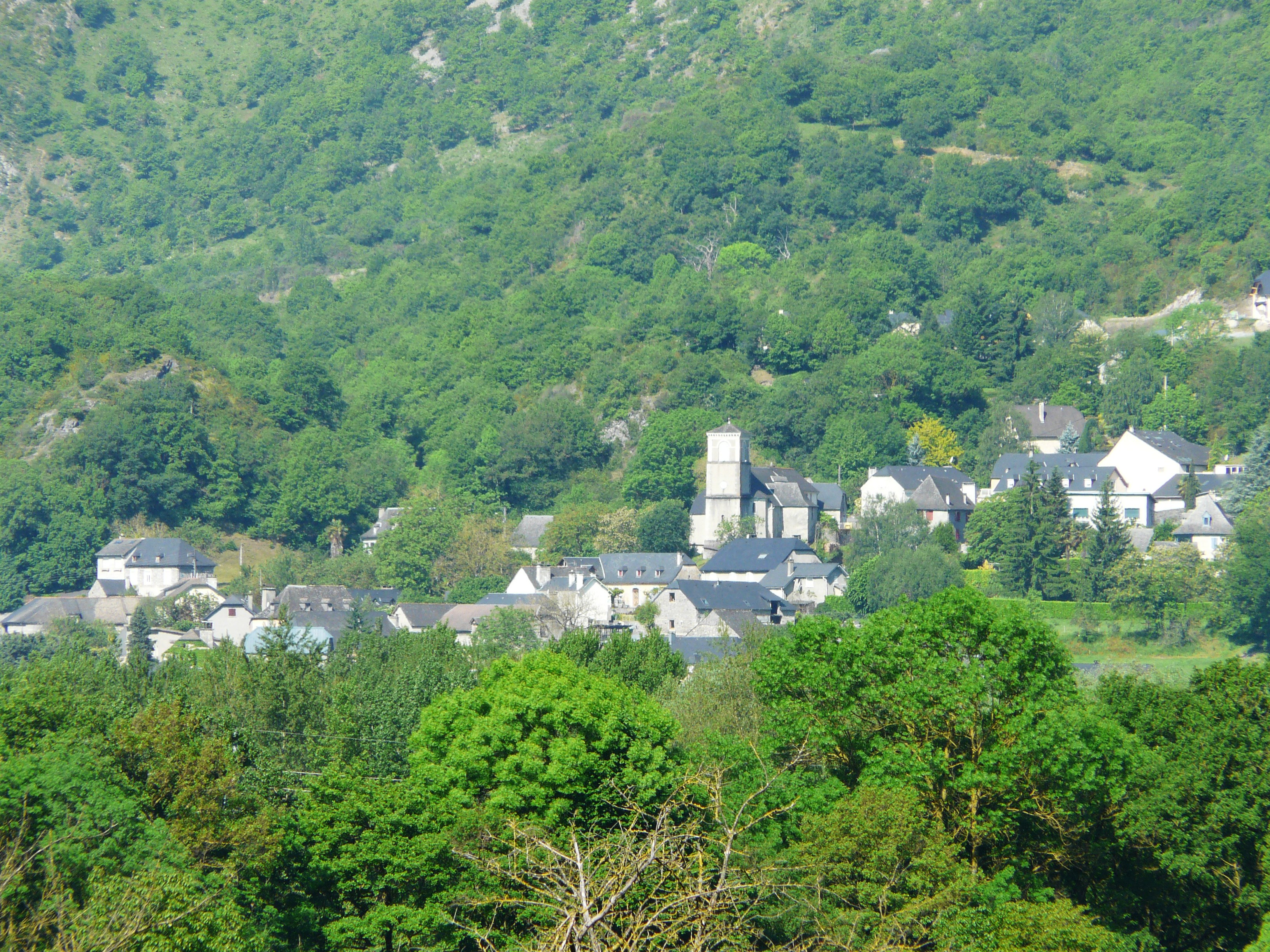 Le village d'Agos, Agos-Vidalos, Hautes-Pyrénées, France.